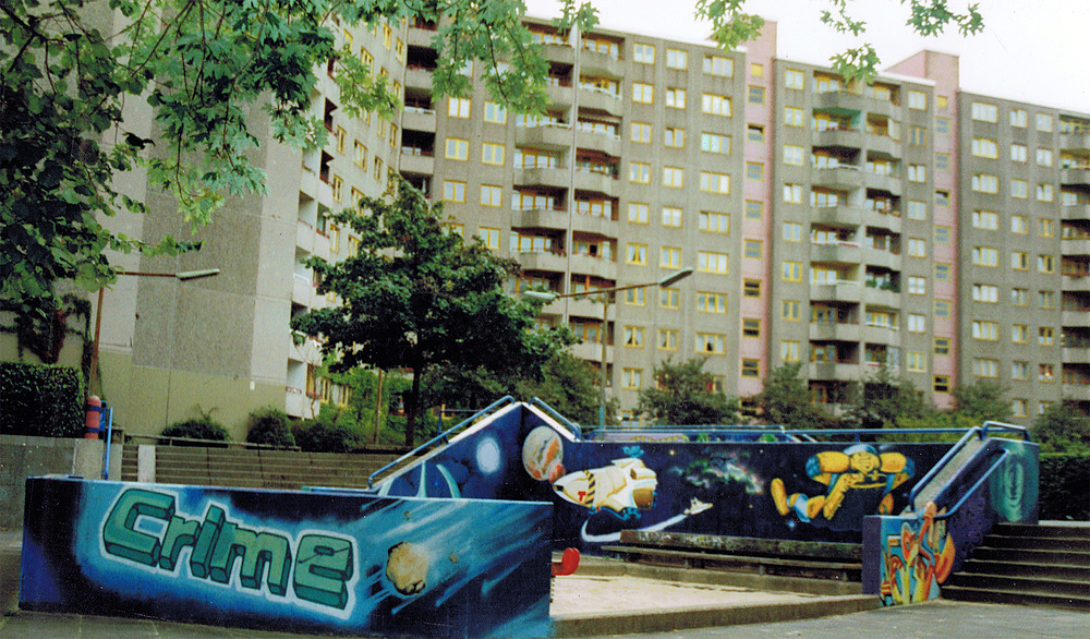 Gesobau Auftragsarbeit Spielplatz bemalt von der denots crew 1997